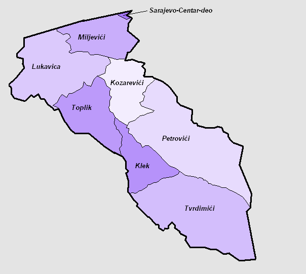 Мапа Лукавице